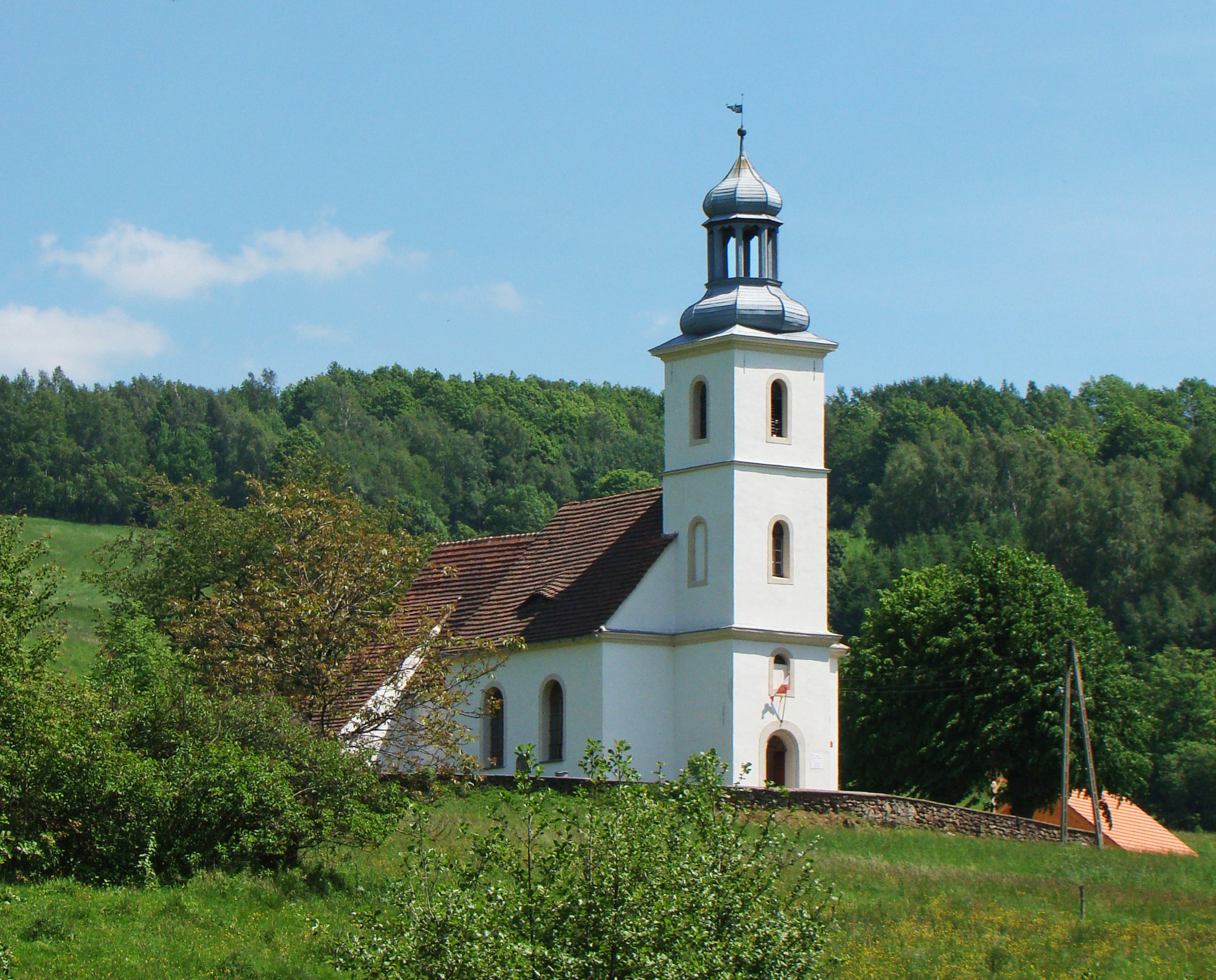 Michałkowa - kościół filialny p.w. św. Anny, k.XVIII, 1835 (zabytek nr rejestr. A/1835/1739 z 30.06.1966)